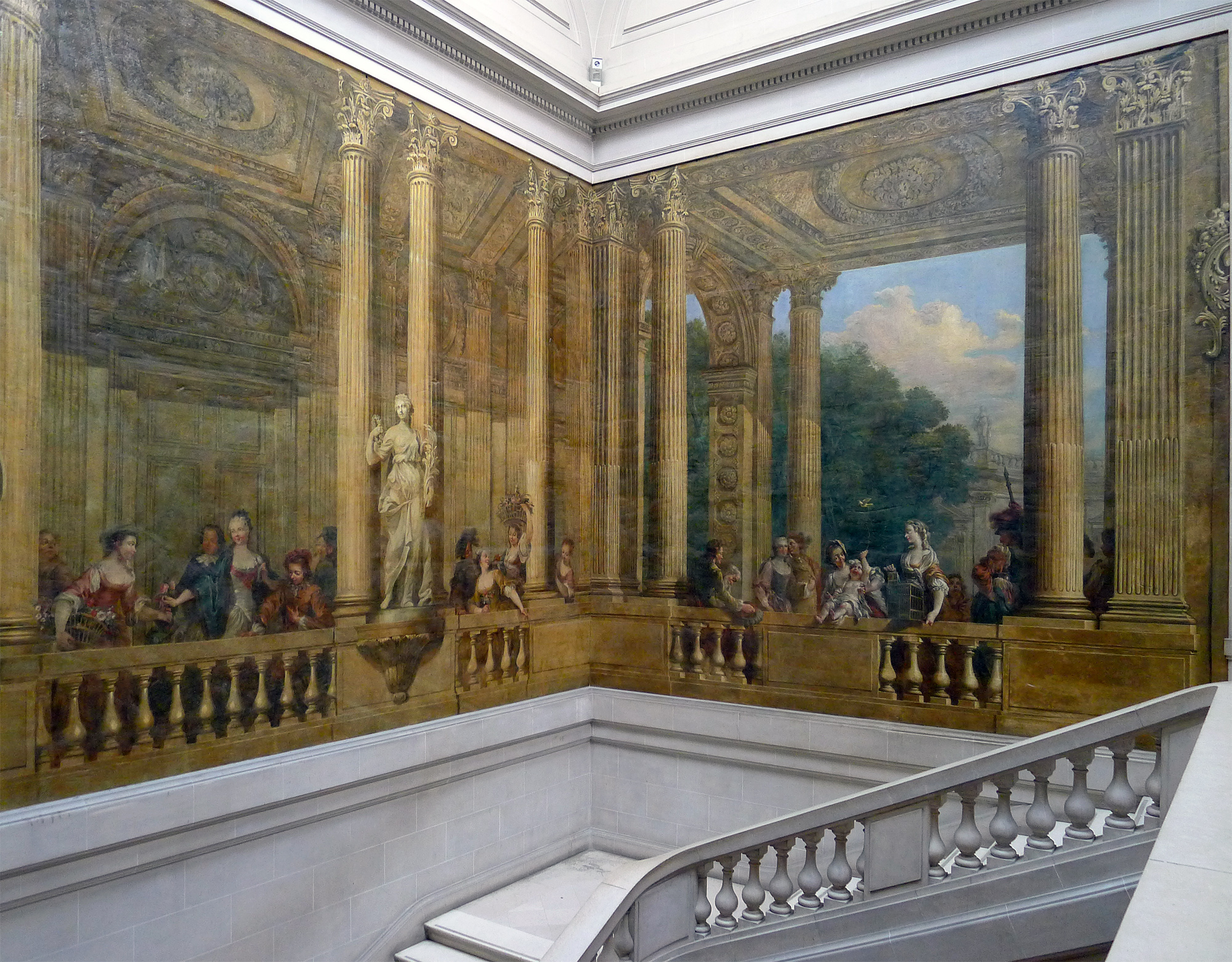 Musée Carnavalet : peinture murales du grand escalier - Paris IIICes peinture murales, réalisées en 1748 par les Brunetti, proviennent le l'ancien hôtel de Luynes sis boulevard Saint-Germain.